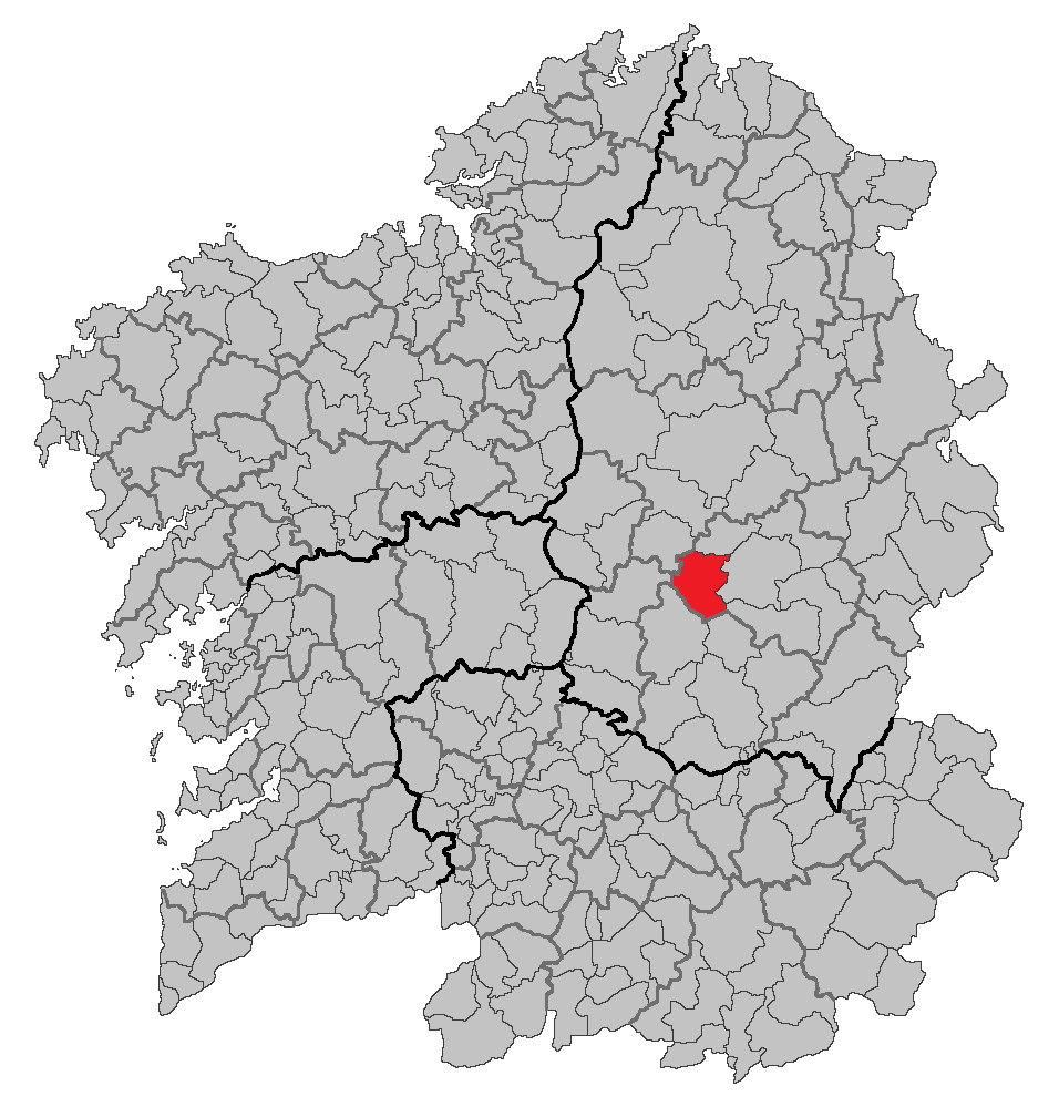 Mapa coa localización do concello de Paradela.